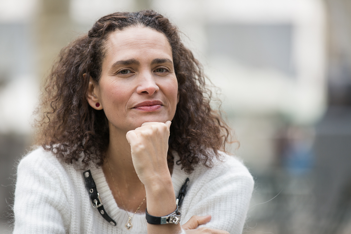 Frederique Bedos